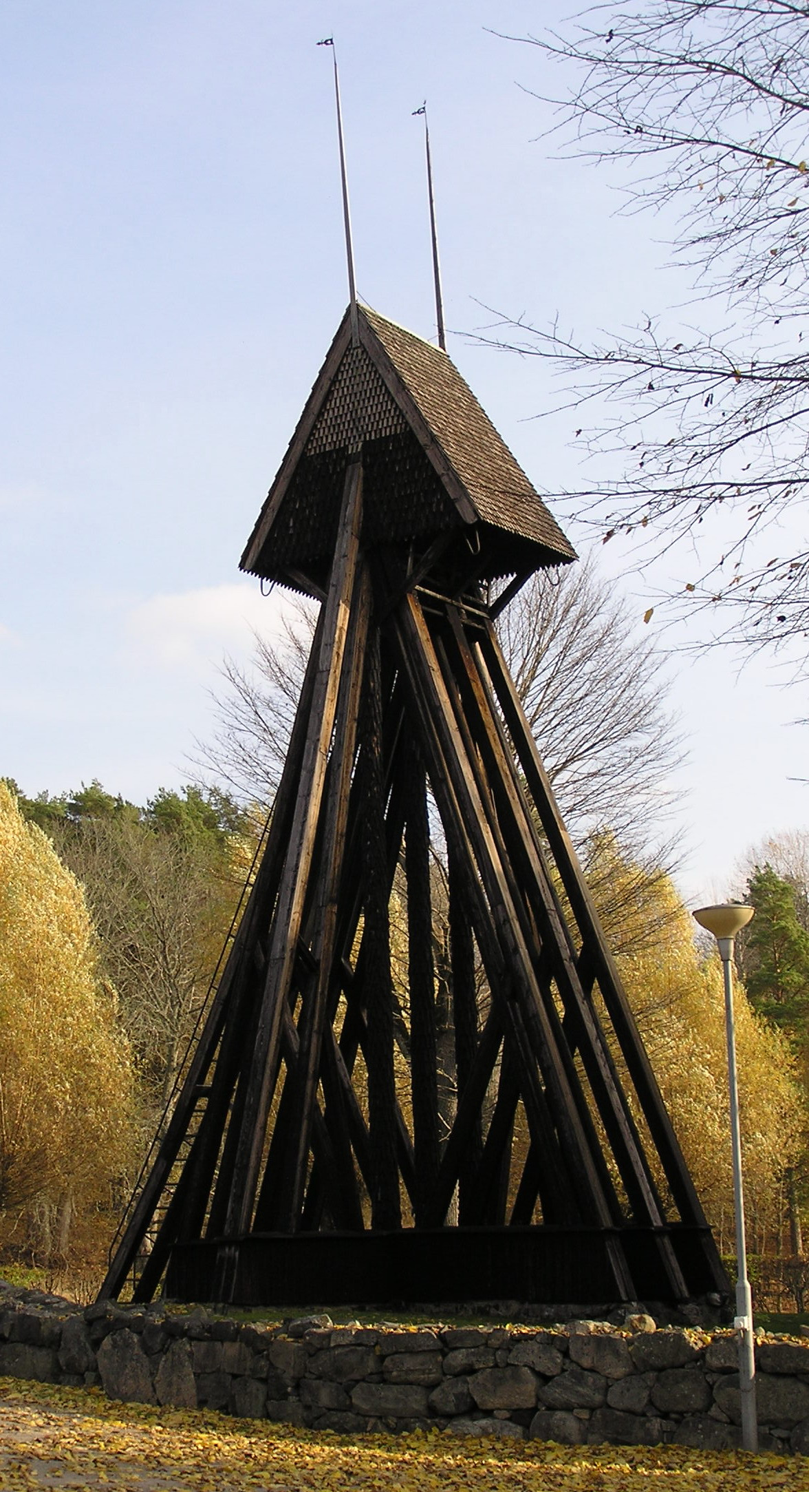 Helgesta kyrka, Södermanland. Klockstapeln, oktober 2007.